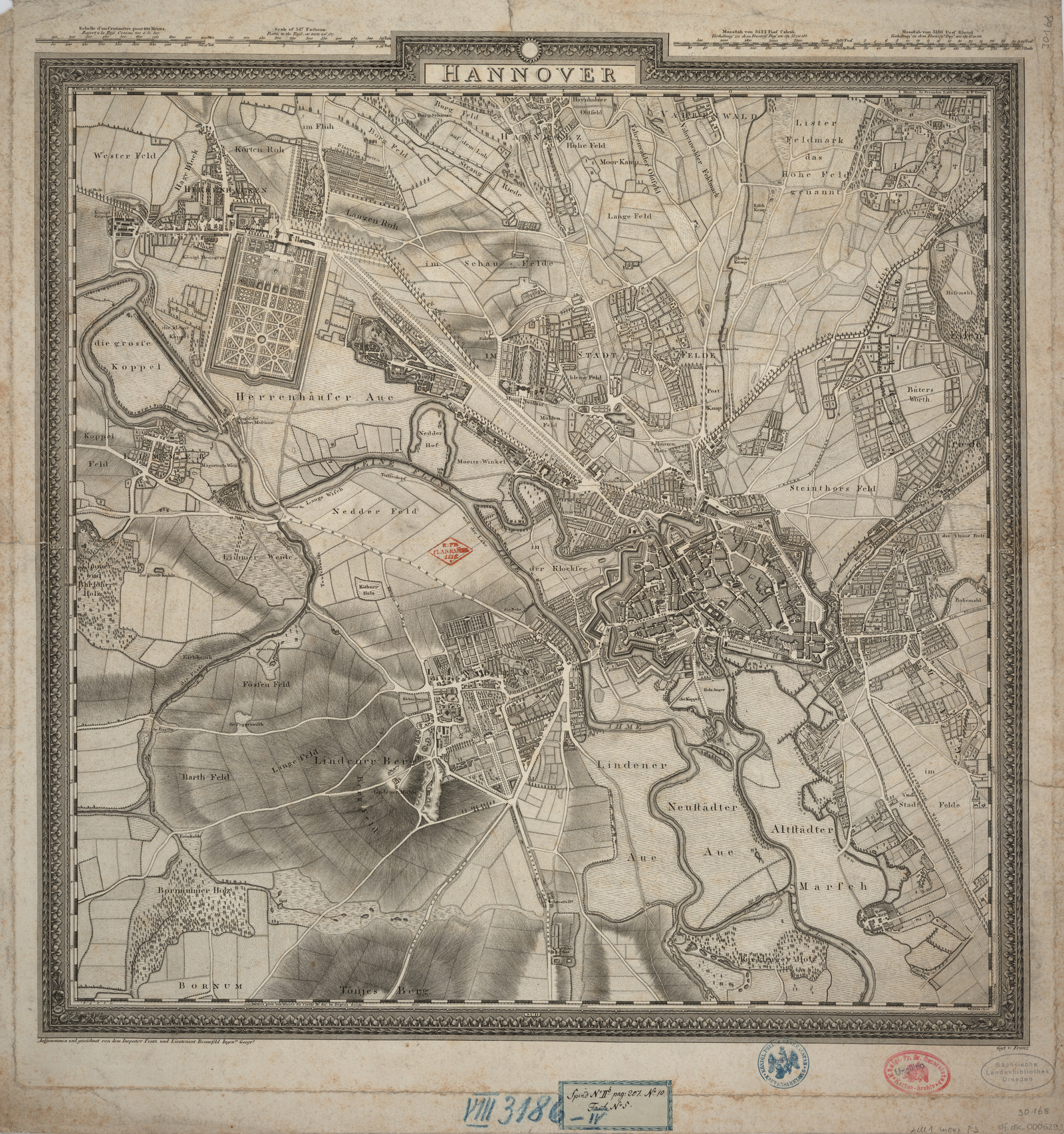 Verkleinerte Ausgabe der Karte der Stadt Hannover und ihrer Umgebung, aufgenommen von Inspektor Pentz und Leutnant Ludwig Bennefeld, im Maßstab 1 : 10.000 von Franz in Berlin in Kupfer gestochen und 1807 im der Buchhandlung Gebrüder Hahn in der Leinstraße verlegt ...